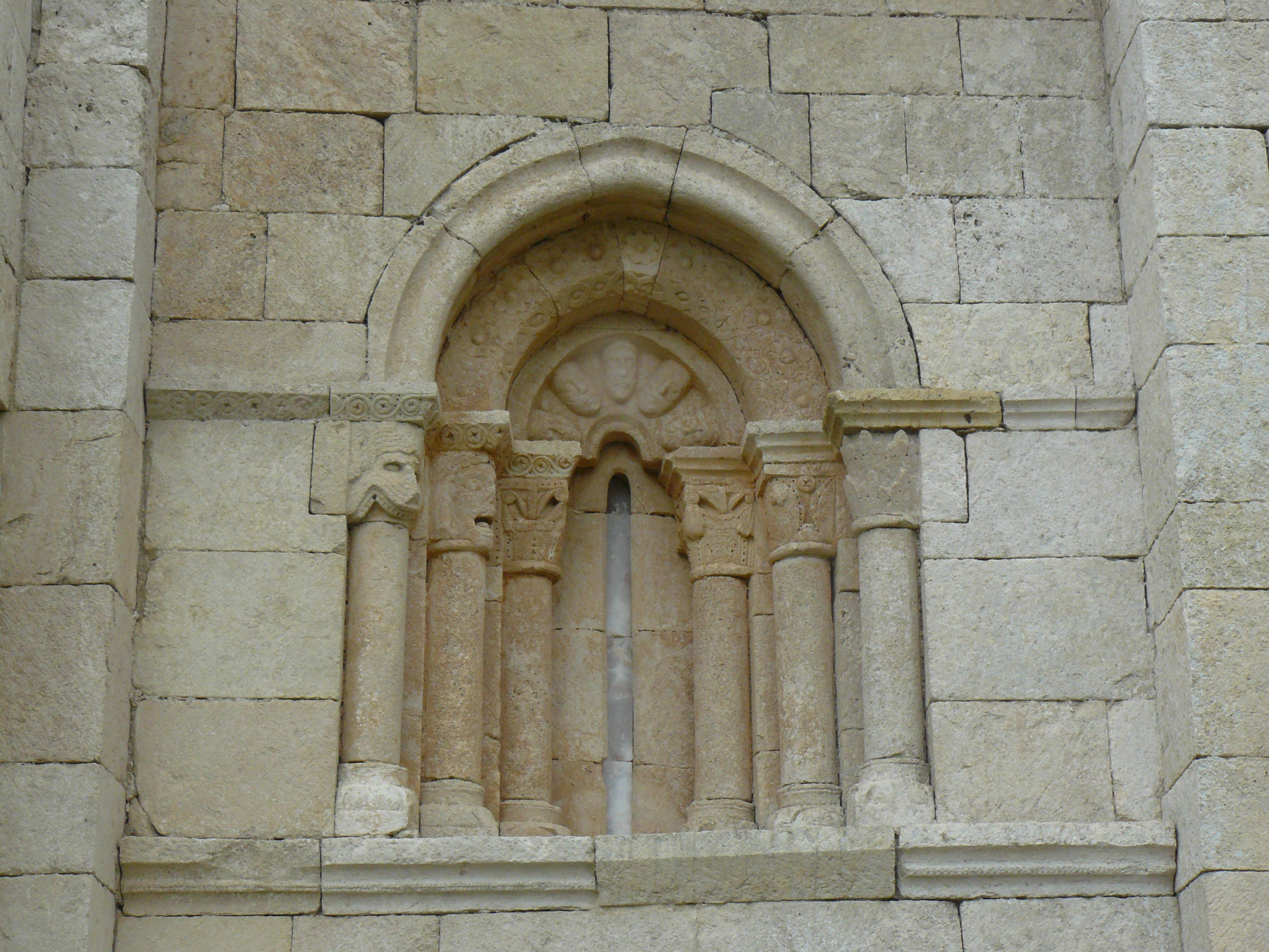 Ermita de San Pantaleón de Losa, Burgos.